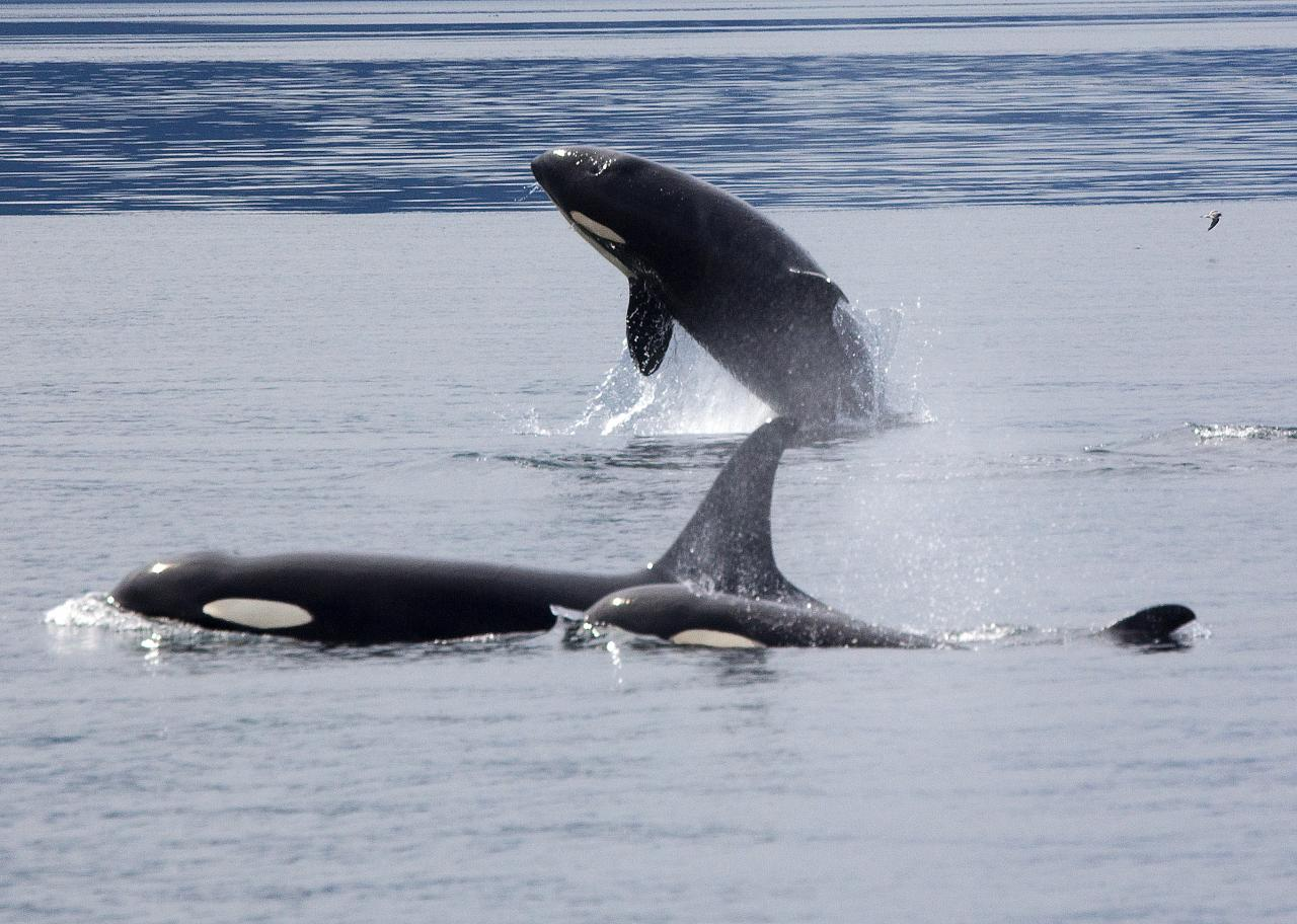 glacier bay